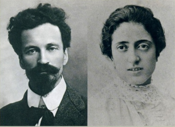 Foto parallele di Cesare Battisti e della moglie Ernesta Bittanti Battisti, scattate prima del 1915.